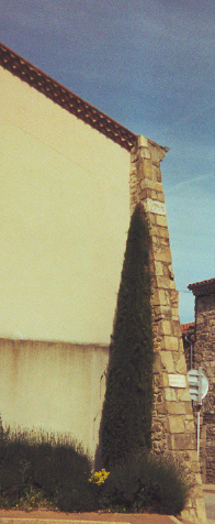 contrefort soutenant le mur d'une maison particulière, du coté d'une place, après démolition de la maison mitoyenne. À Maclas, face à la maison des associations, route de Saint-Apollinard. Contrefort dans l'architecture civile.